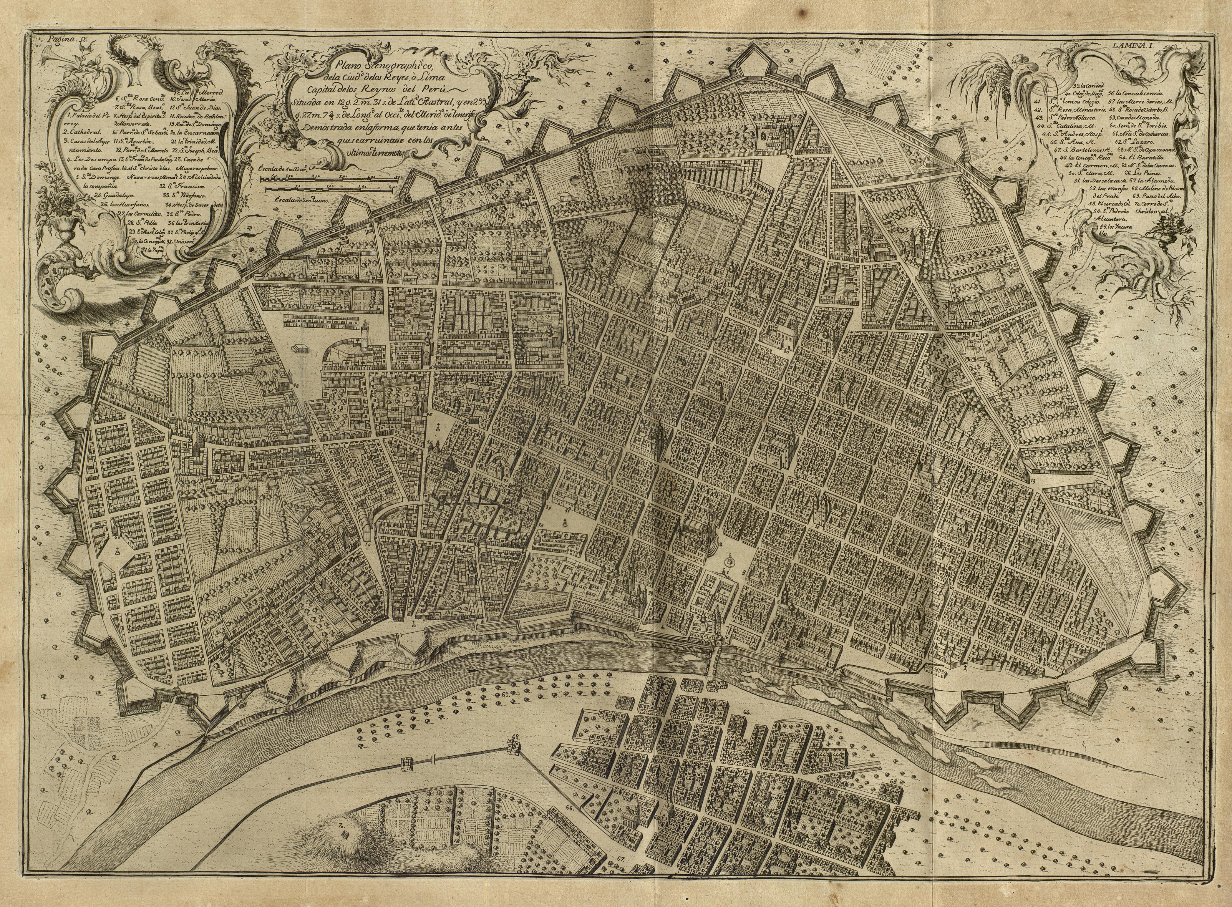 Título / Autor: Relacion historica del viage a la America meridional : hecho de orden de S. Mag. para medir algunos grados de meridiano terrestre ... con otras varias observaciones astronomicas, y phisicas / por Don Jorge Juan ... y Don Antonio de Ulloa ... ; Primera parte, tomo primero [- Segunda parte, tomo quarto] Más detalles: PUBLICACIÓN En Madrid : por Antonio Marín, 1748 DESCR. FÍSICA 4 v. (I: [24], 404 p., XIII h. de grab. pleg., [1] h. de grab.; II: [4] p. 405-682, [2] en bl., [8] h. de grab. pleg.; III: [12], 379, [1] p. en bl., X h. de grab., [1] h. de grab.; IV: [4], p. 381-603 p., [1] en bl., CXCV p., [1] en bl., [4] h. de grab. pleg.) : il. ; Fol. CONTIENE Primera parte, tomo primero - Primera parte, tomo segundo - Segunda parte, tomo tercero - Segunda parte, tomo quarto DESCR. FÍSICA Sign: I: 4, 2¶-3¶4, A-Z4, 2A-2Z4, 3A-3D4, 3E2 ; II: 4, 3F-3Z4, 4A-4P4, 4Q6 ; III: [¶]6, A-Z4, 2A-2Z4, 3A4, 3B2 ; IV: 3B3-4, 3C-3Z4, 4A-4Z4, 5A-5G4, 5H6 Antep. ILUSTRACIONES Port. a dos tintas y con grab. calc. Inic., frisos y ornam. xil. Las h. de grab. calc. todas numeradas en romanos: "Is. á Palom.º sculp. Regs. inv. del. et incidit", "Vicente de la Fuente F en Madrid", "Moreno sculp. Matti.", "Cs. Bargas dt.", " Cs. Casanova ext.", "Jv. Peña Tallador", "Paulus Minguet sculp.", "Diego de Villanueva i.d.", "Didacus Villanova invenit et delineavit, Palom.º sculp... Matriti Anno MDCCXLVIII" Localización: Catálogo Fama Vea la ilustración en su contexto